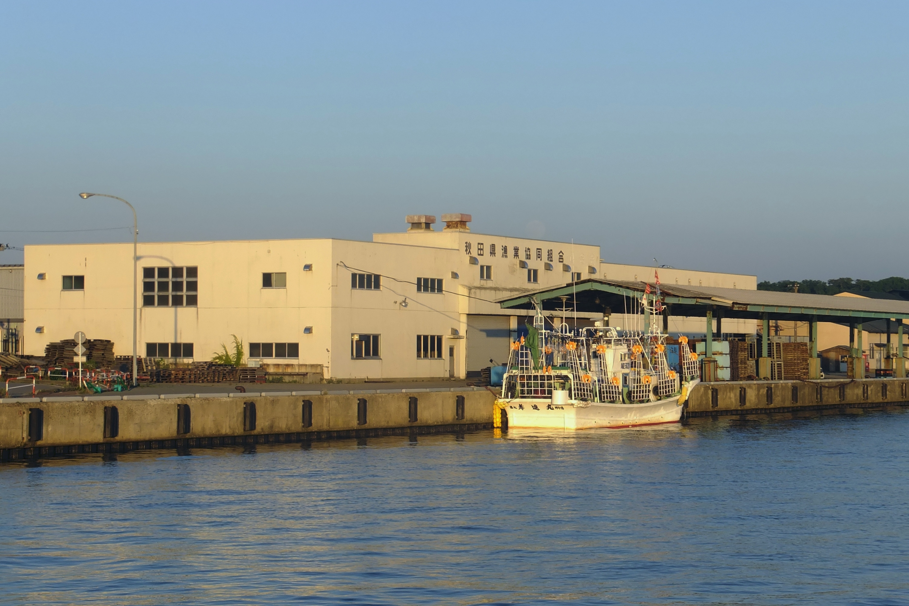 秋田県漁業協同組合（秋田市土崎港）